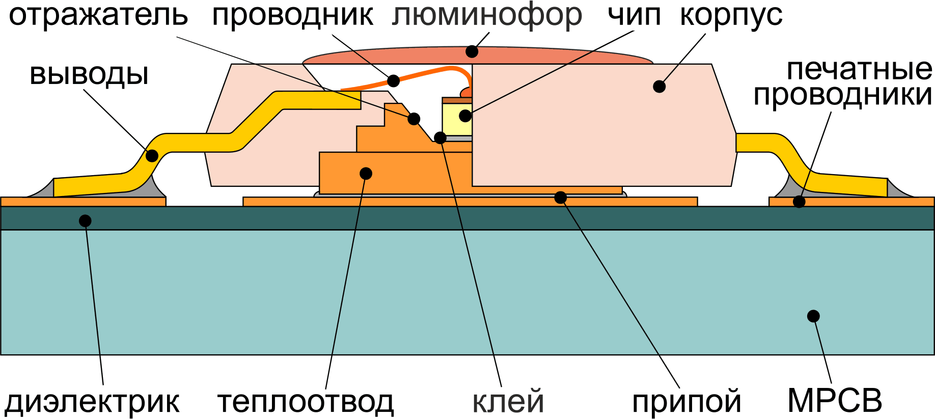 Белый светодиод